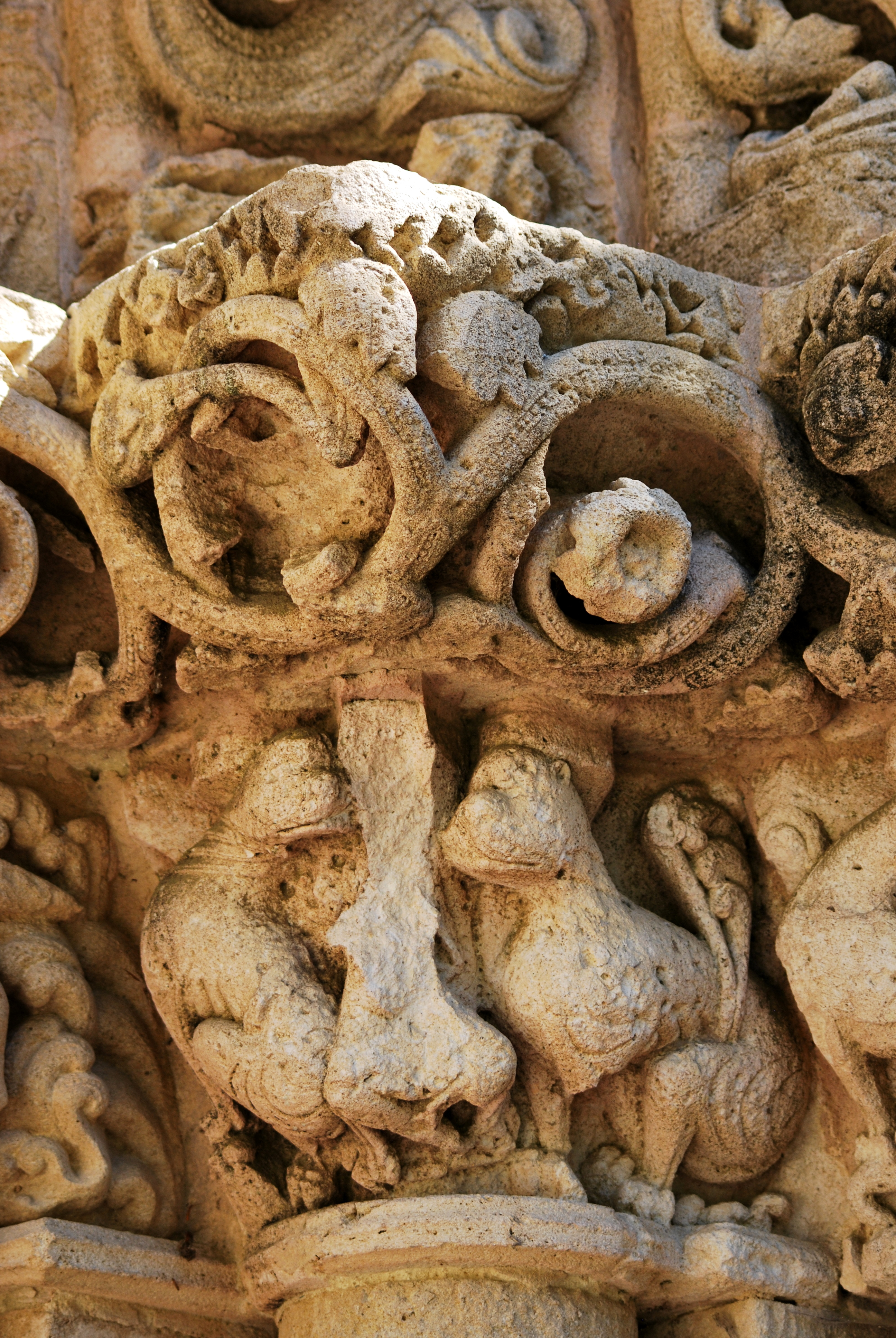 Blasimon église St Nicolas portail